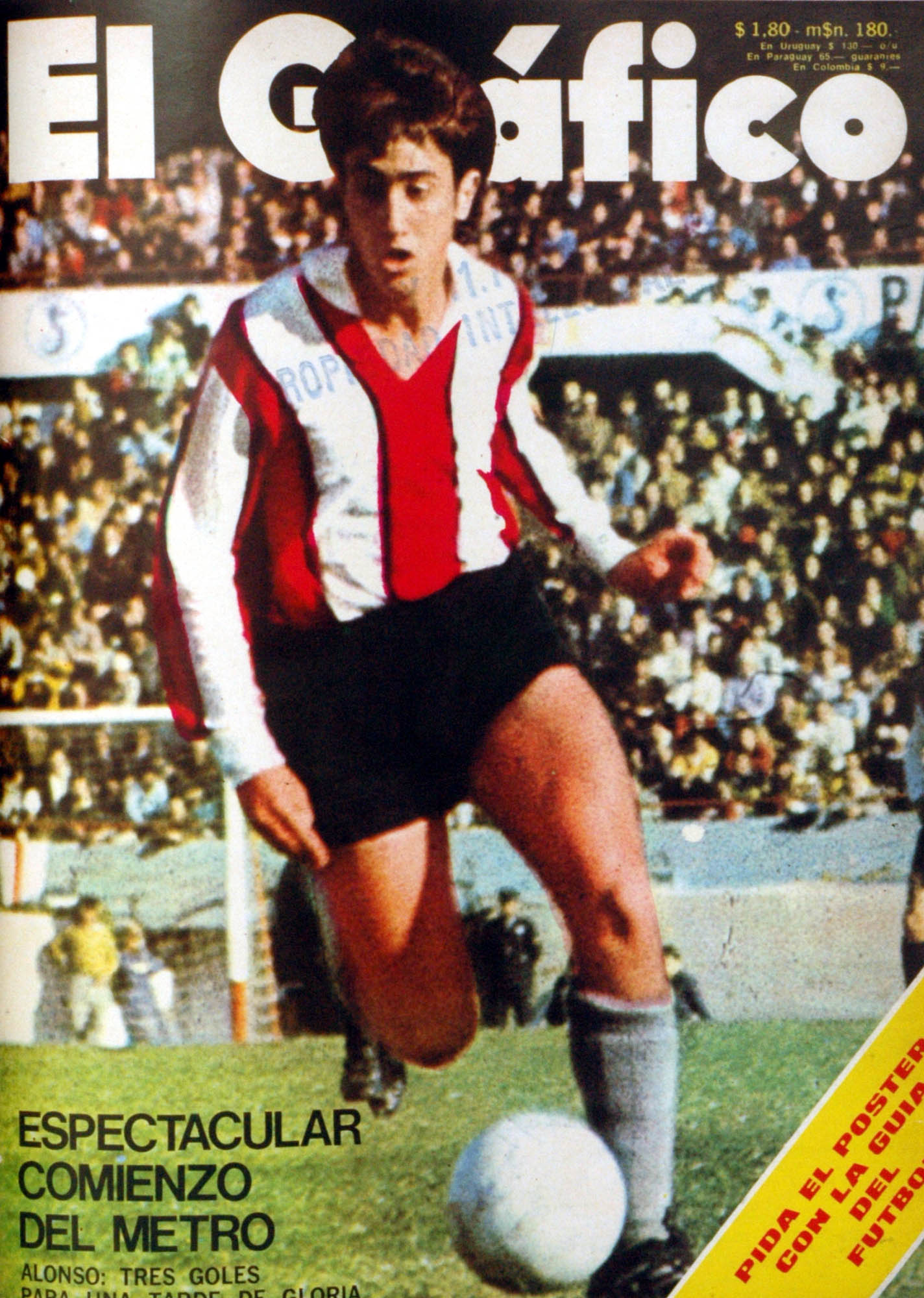 El Grafico del 29 de Febrero de 1972. Edicion 2734